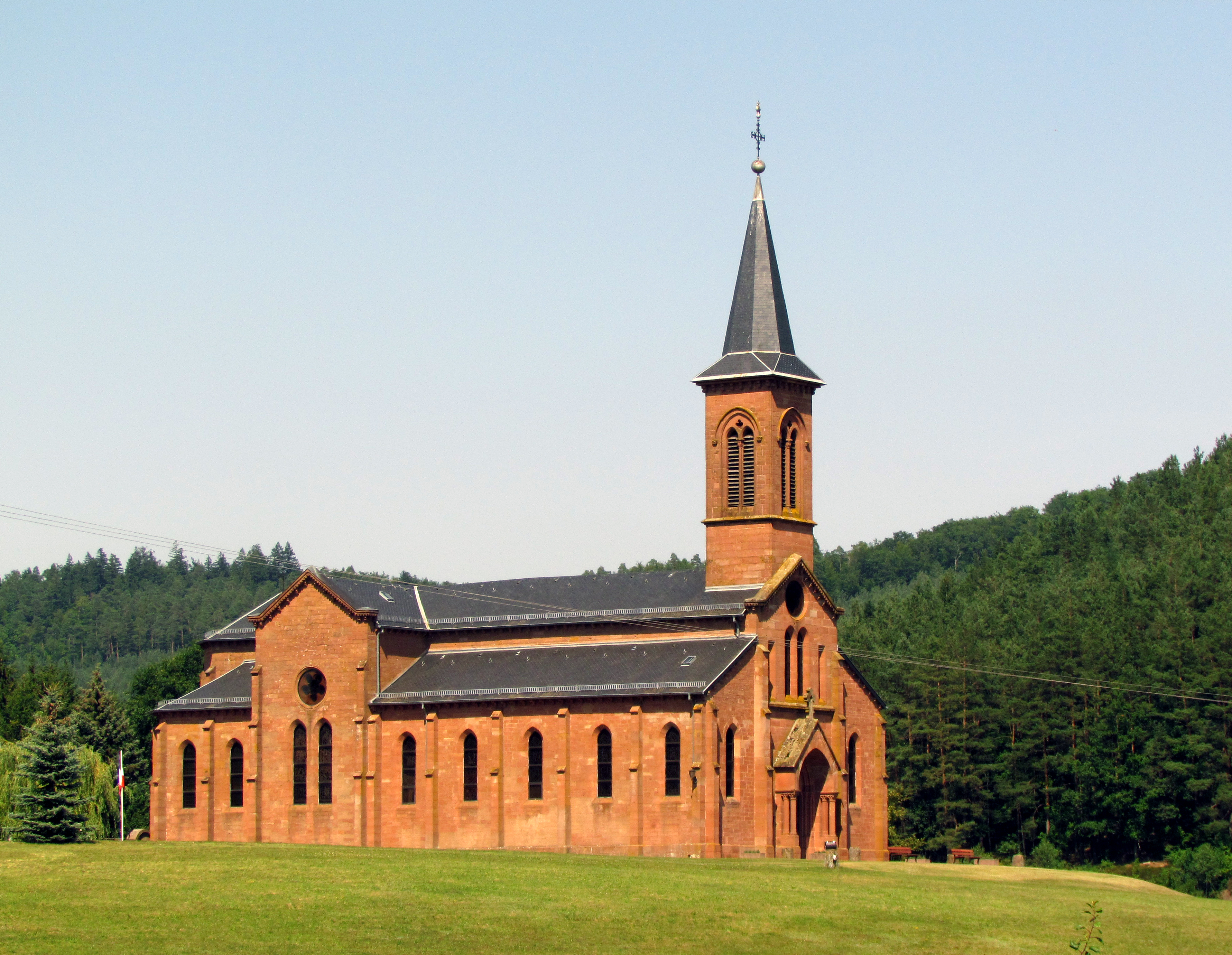 Bildinhalt: Die Kirche von Éguelshardt Aufnahmeort: Éguelshardt, Frankreich